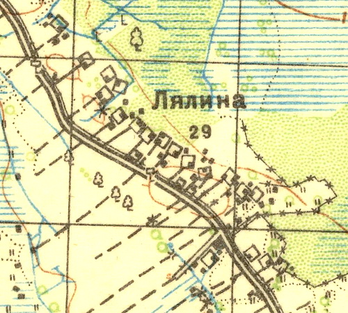 Топографическая карта Ленинградской области, квадрат О-35-23-В (Хотыницы), деревня Лялино